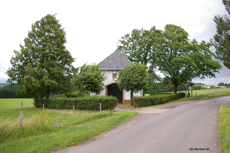 Die Valentinuskapelle außerhalb der Ortslage.